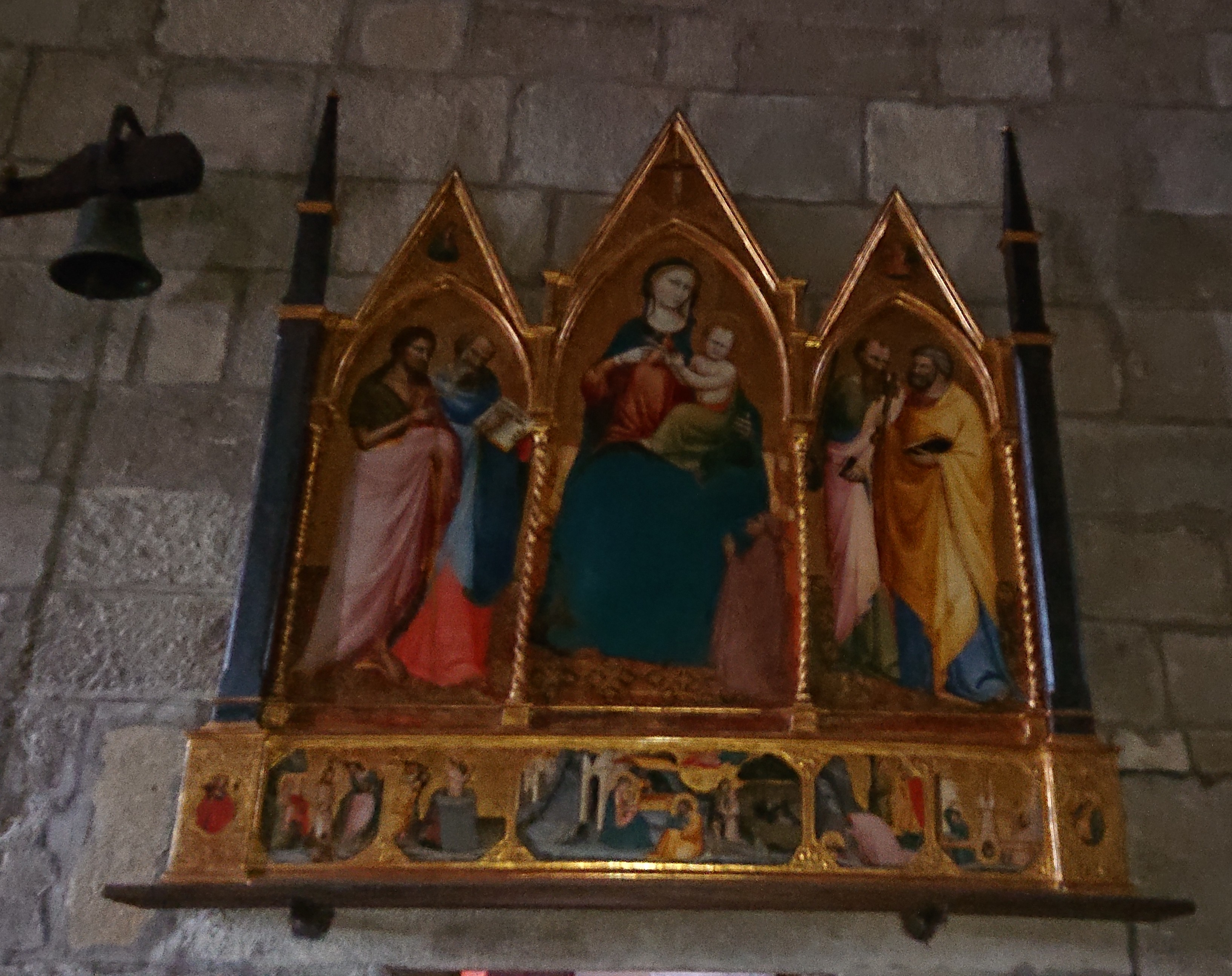 Tempera su tavola a fondo d'oro, di Bicci di Lorenzo (1373 - 1452) che raffigura nella parte centrale la Vergine con Bambino e ai lati San Giovanni Battista , San Giovanni Evangelista, San Pietro e San Paolo. Si trova nella Chiesa di San Michele Arcangelo a Cetica.